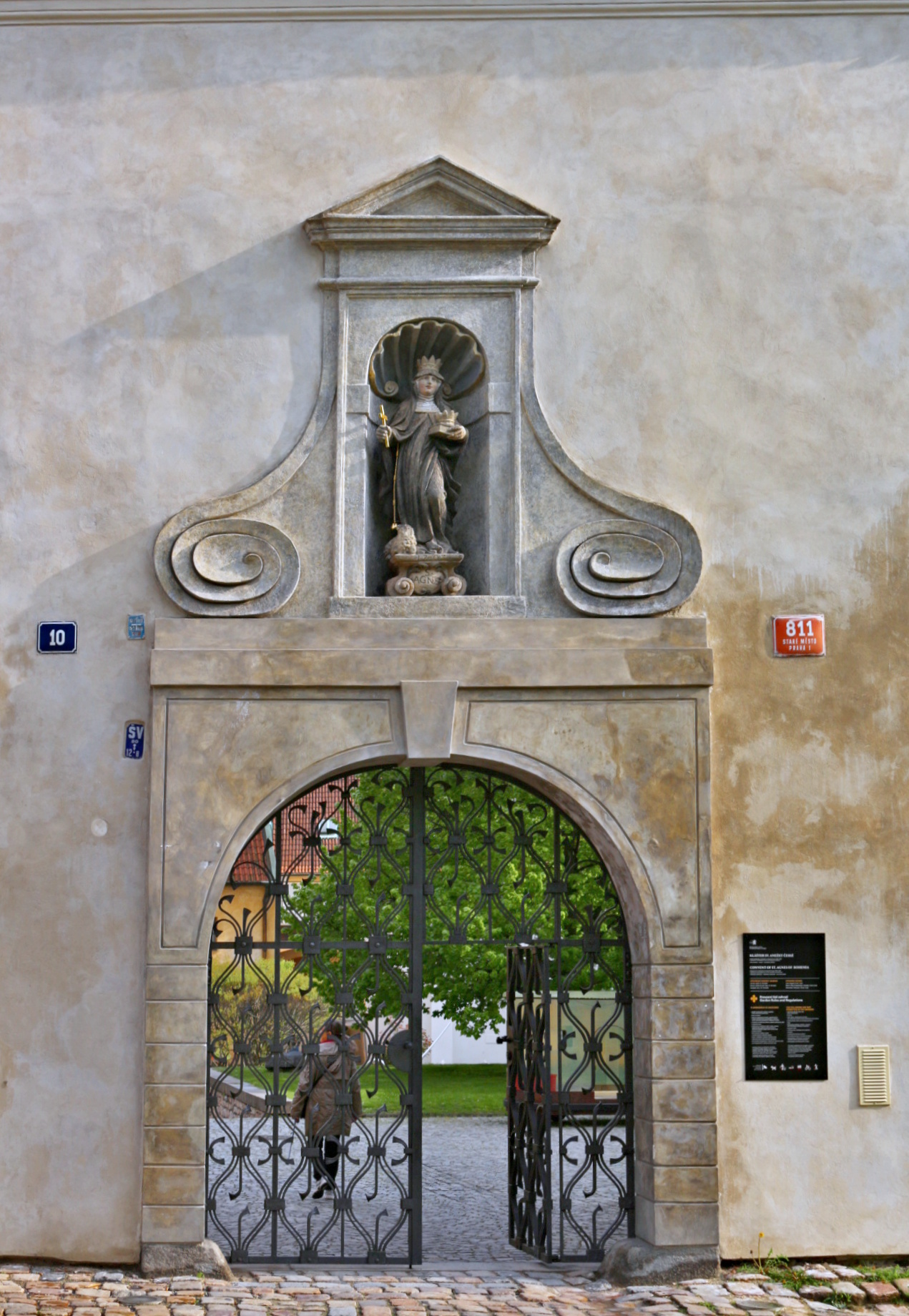 Anežský klášter